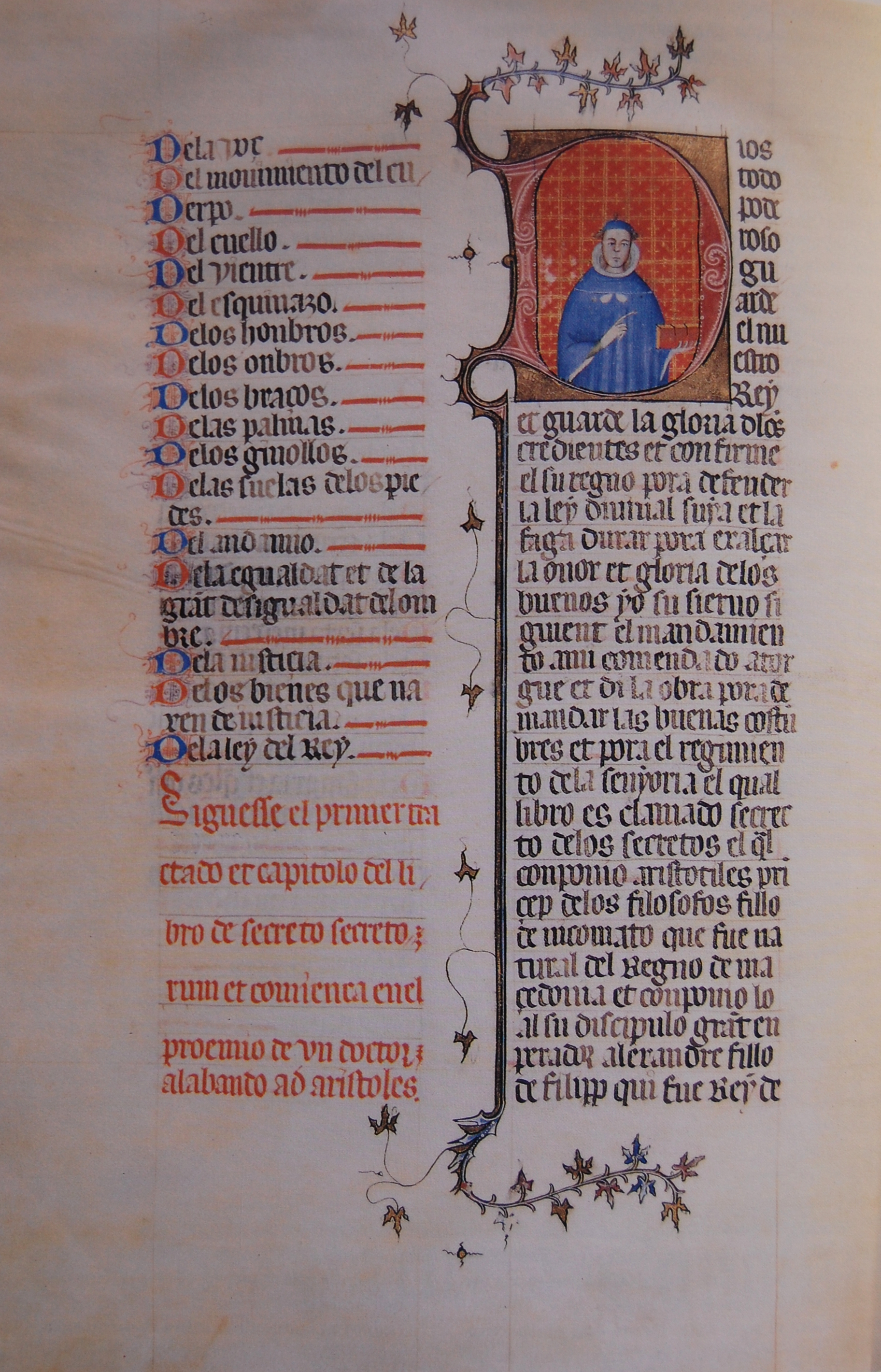 Aragonés: Pachina Prencipio d'o Secreto Secretorum.En a D inicial se representa a Aristótil